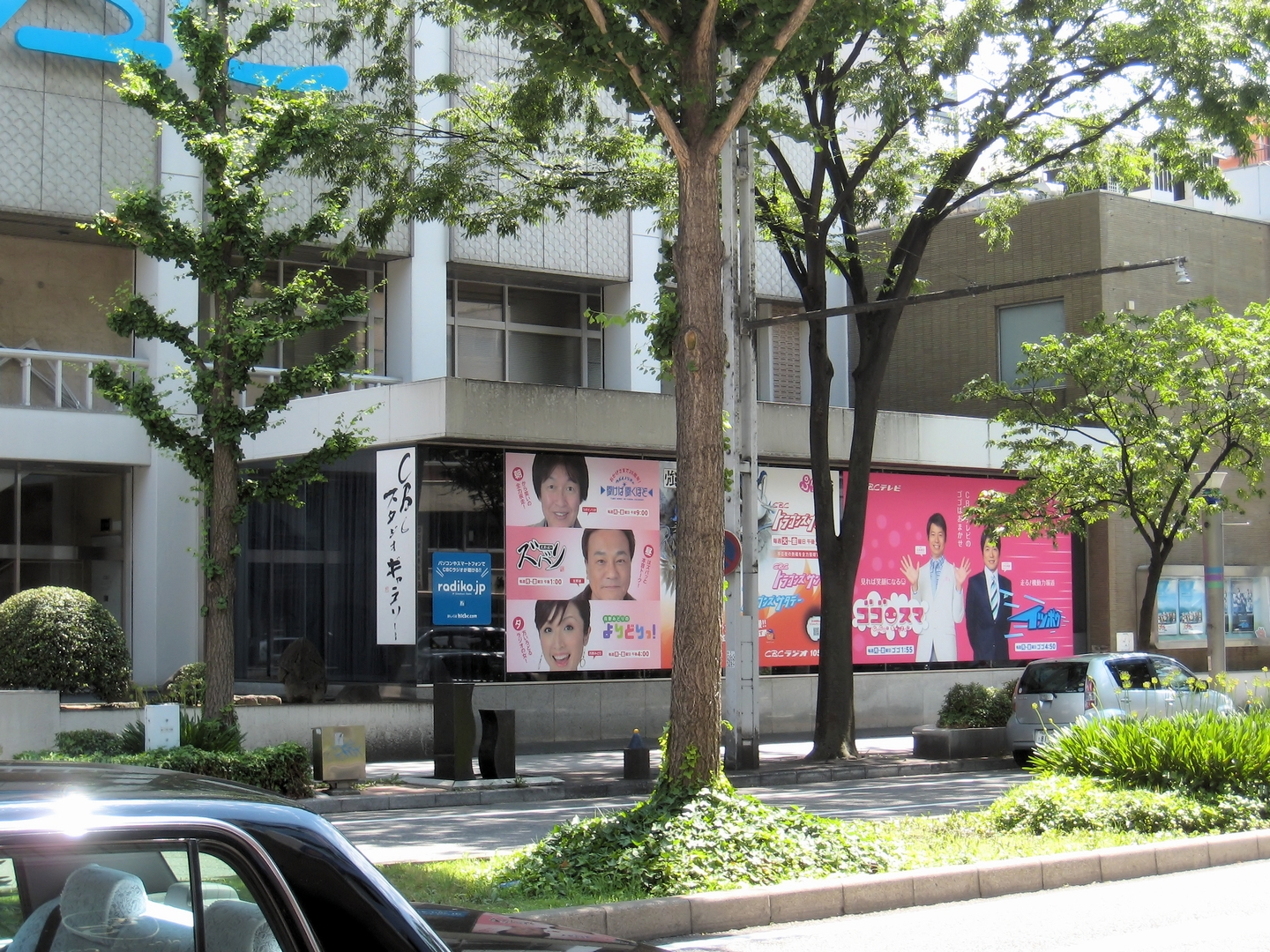 CBC会館1階のスタジオギャラリー